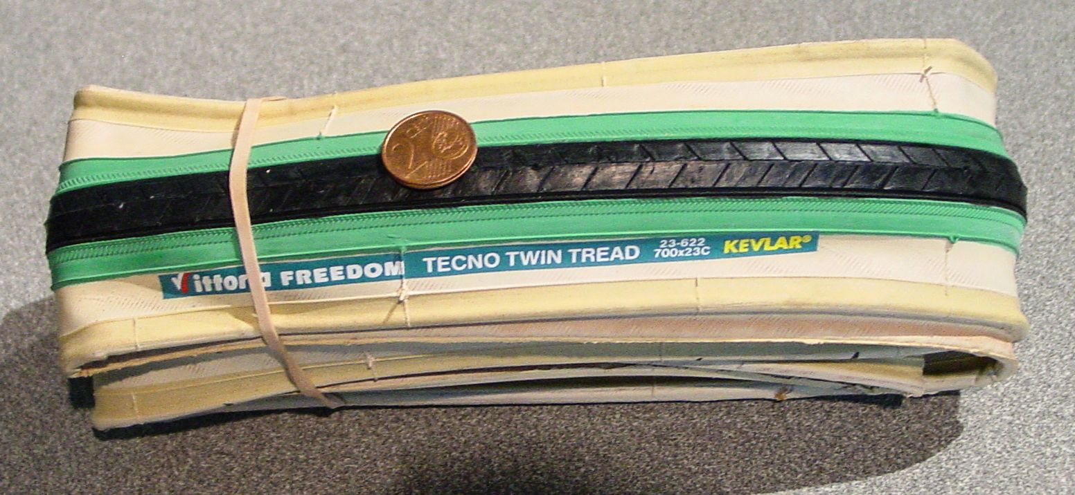 mittelbreiter Faltreifen für Rennrad 23-622